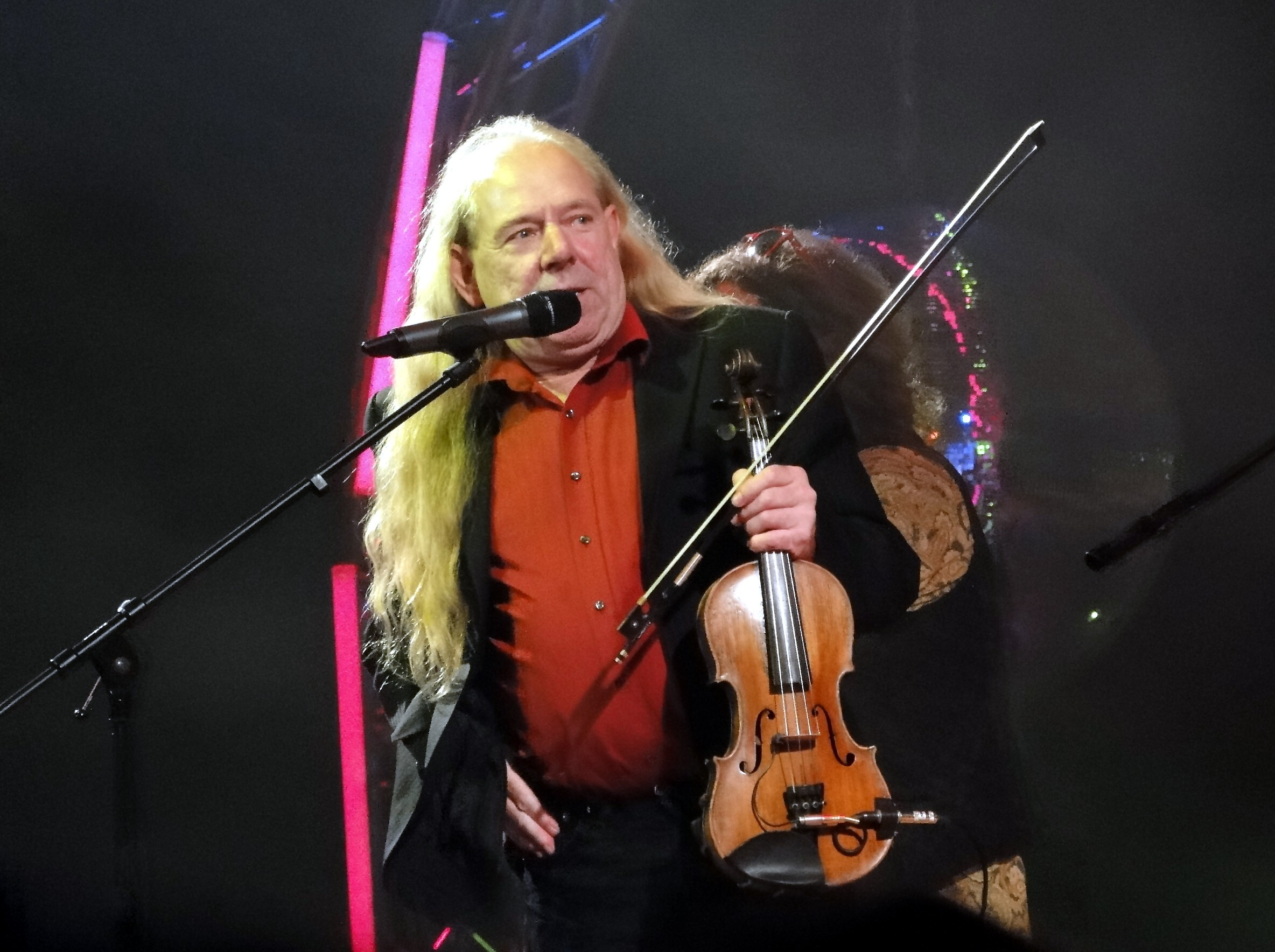 Hans die Geige bei einem Konzert 2010